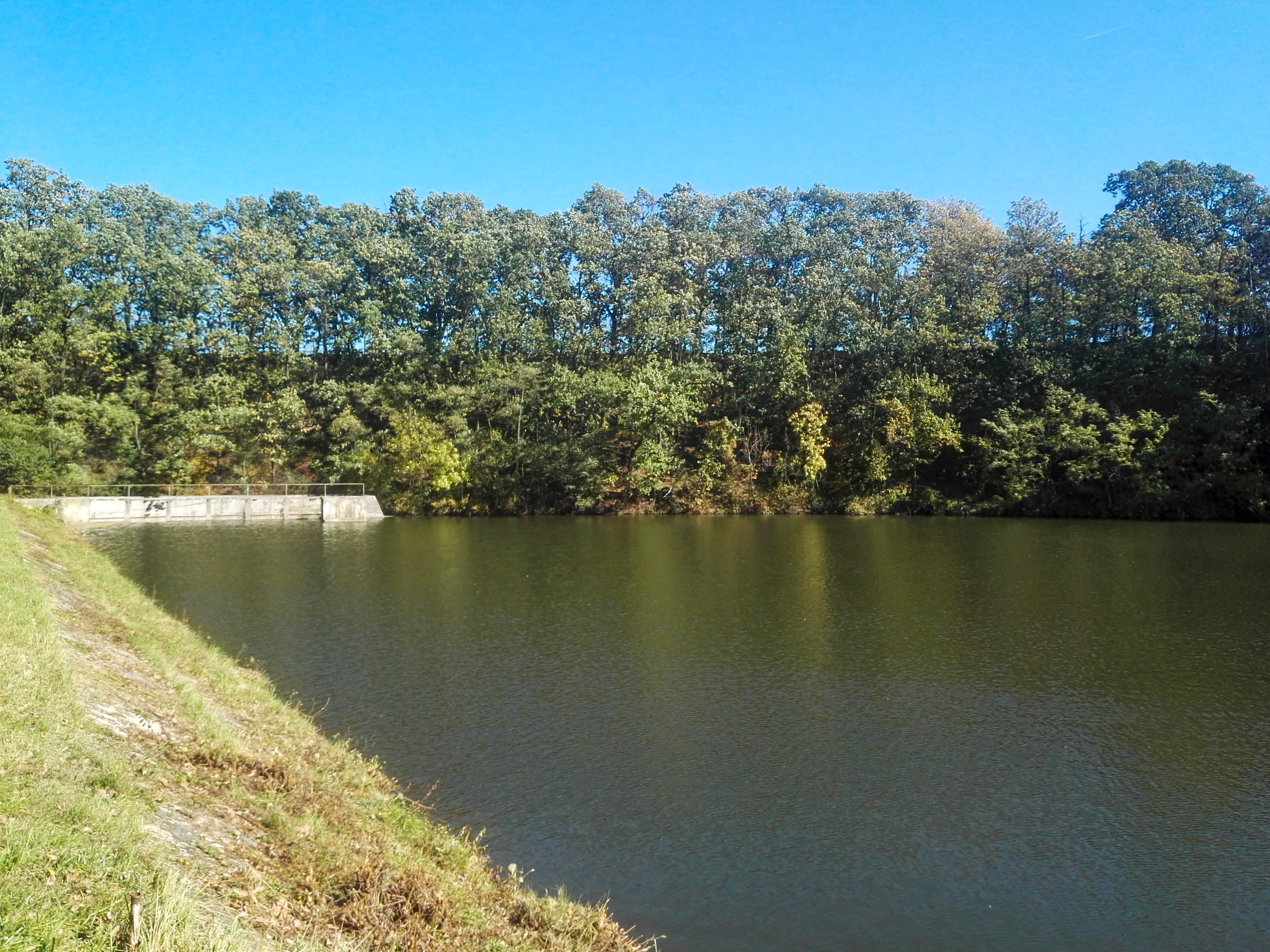 Rybník Markéta, Královice, pohled z hráze na sever k výpusti, podzim 2019